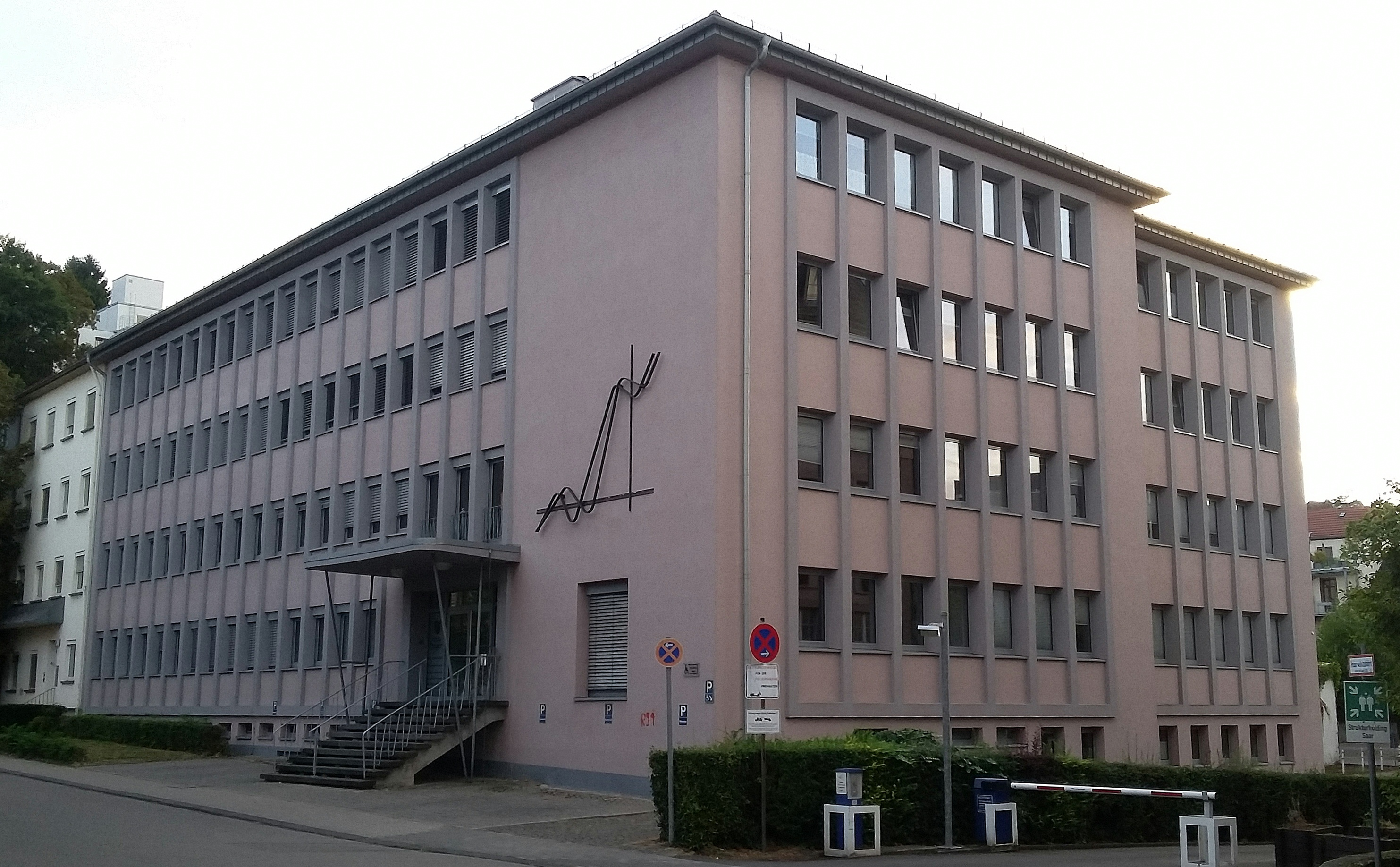 Gebäude des Finanzgerichtes des Saarlandes, des Landesarbeitsgerichts Saarland und des Arbeitsgerichts Saarland in der Hardenbergstraße 3, Saarbrücken